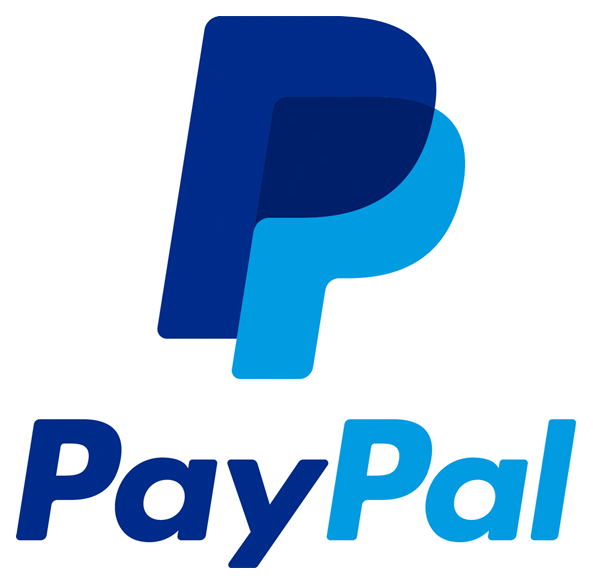 Logo von Paypal, 2014 eingeführt